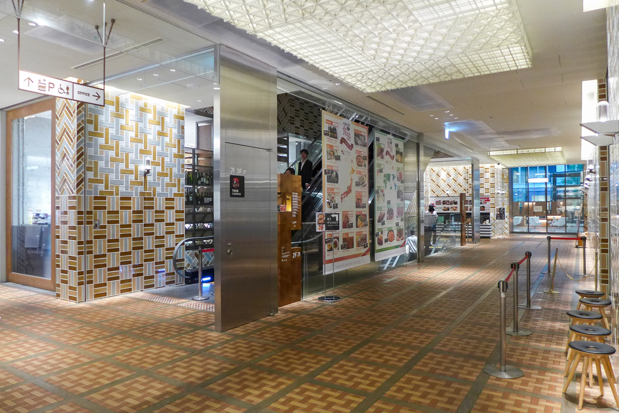 Coredo Muromachi 2 Level 1